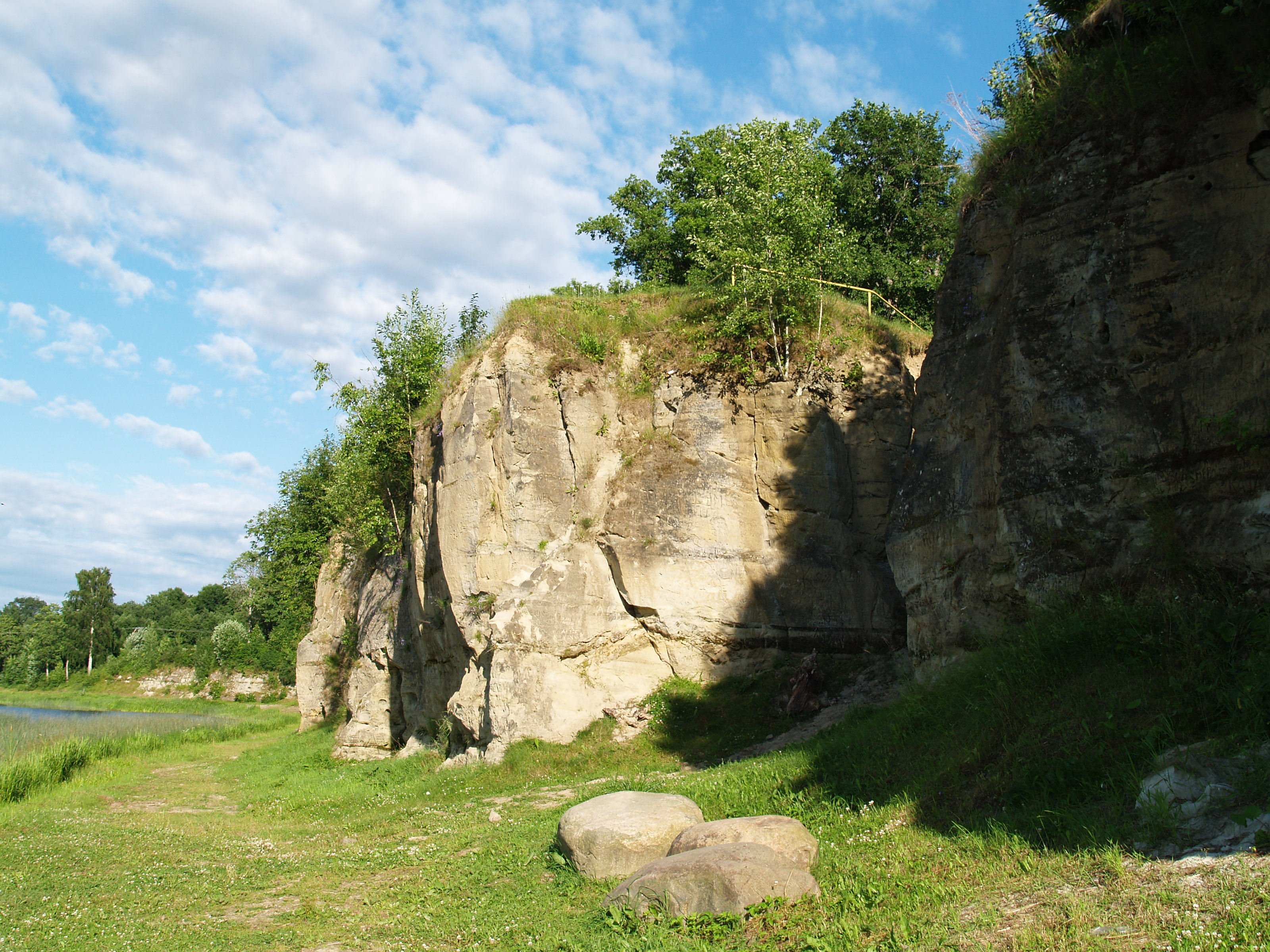 Kesk-Devoni liivakivipaljand Pärnu maakonnas Tori vallas.